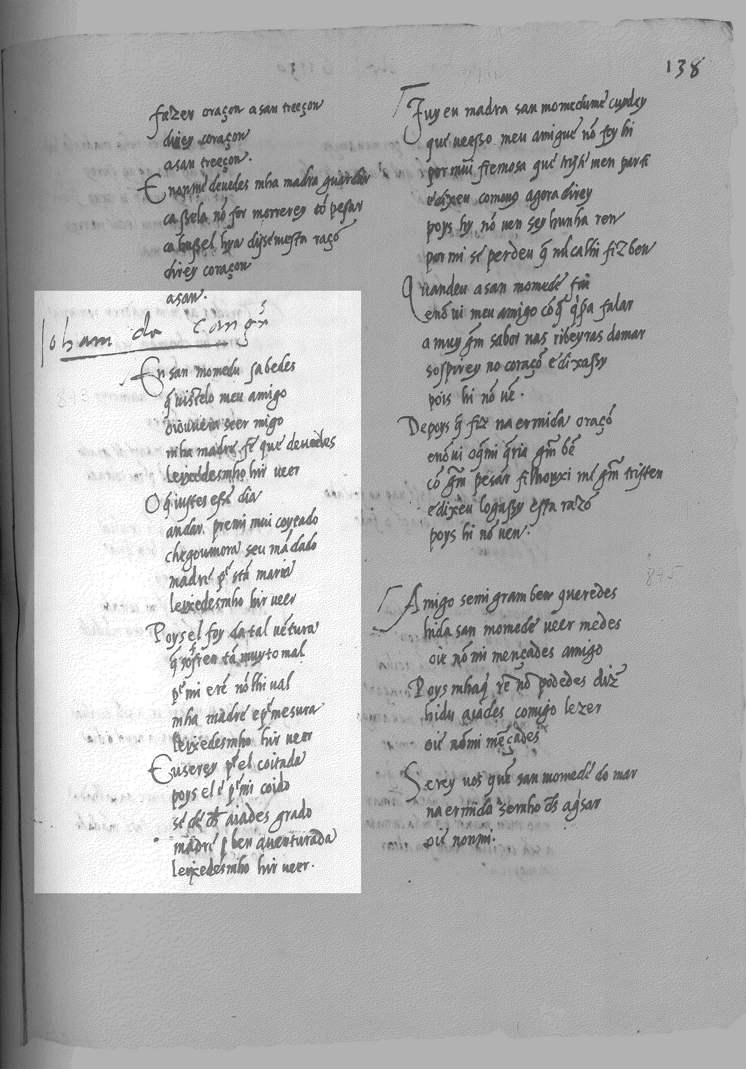 Cancioneiro da Vaticana - V 873